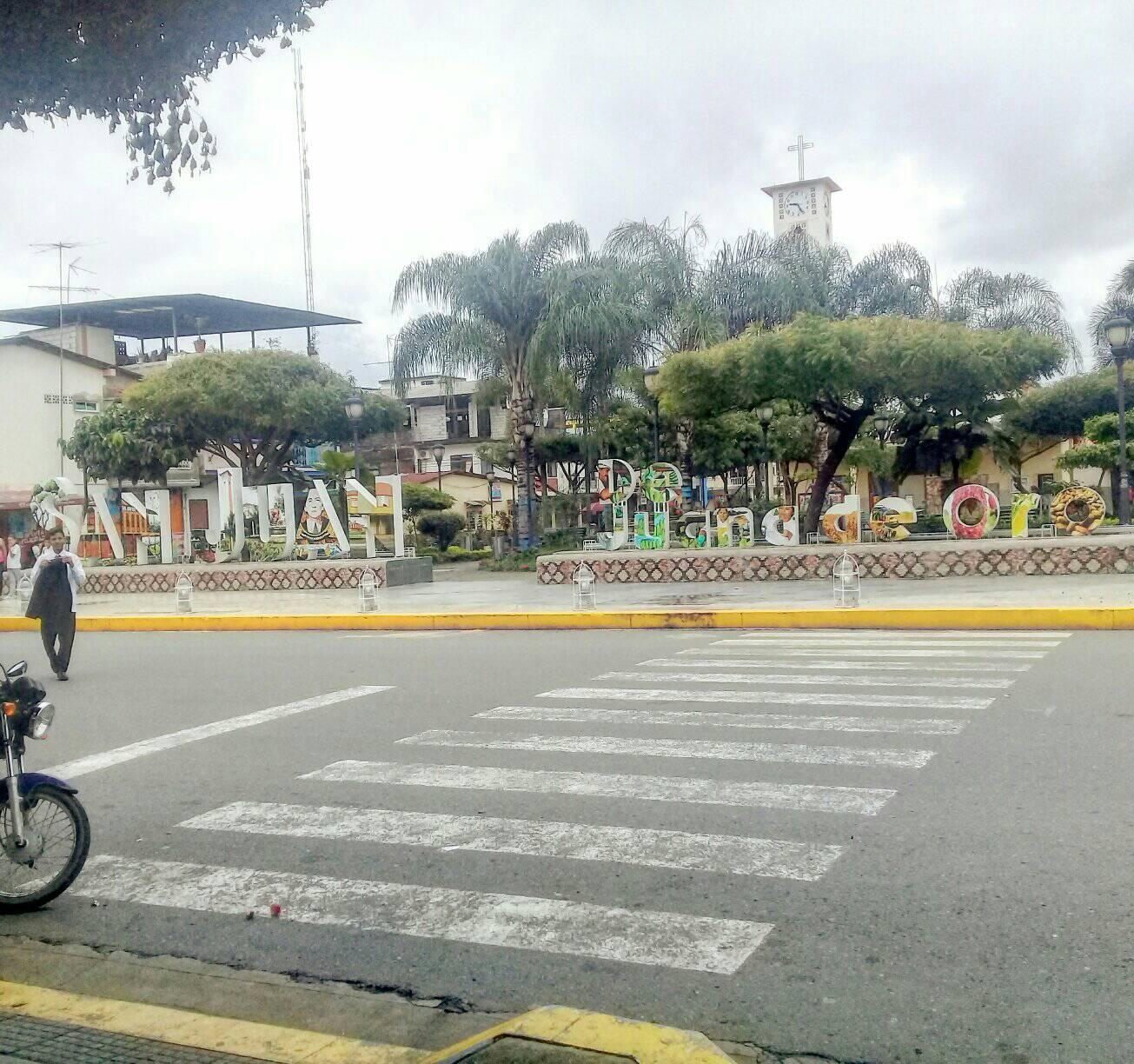 Parque central de San Juan de Juana de Oro, Los Ríos, Ecuador.